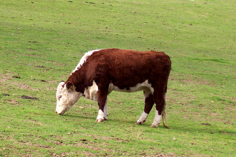 Hereford Steer